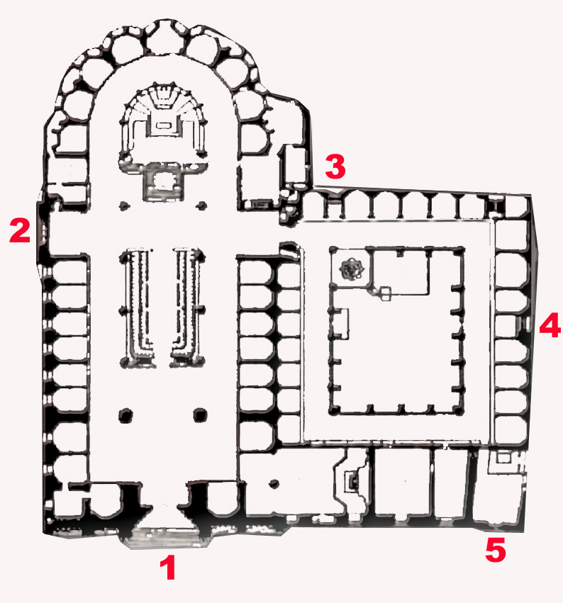 Situació de les portes de la catedral de Barcelona 1- Porta principal 2- Portal de Sant Iu 3- Porta de la Pietat 4- Porta de Santa Eulàlia 5- Porta de Santa Llúcia